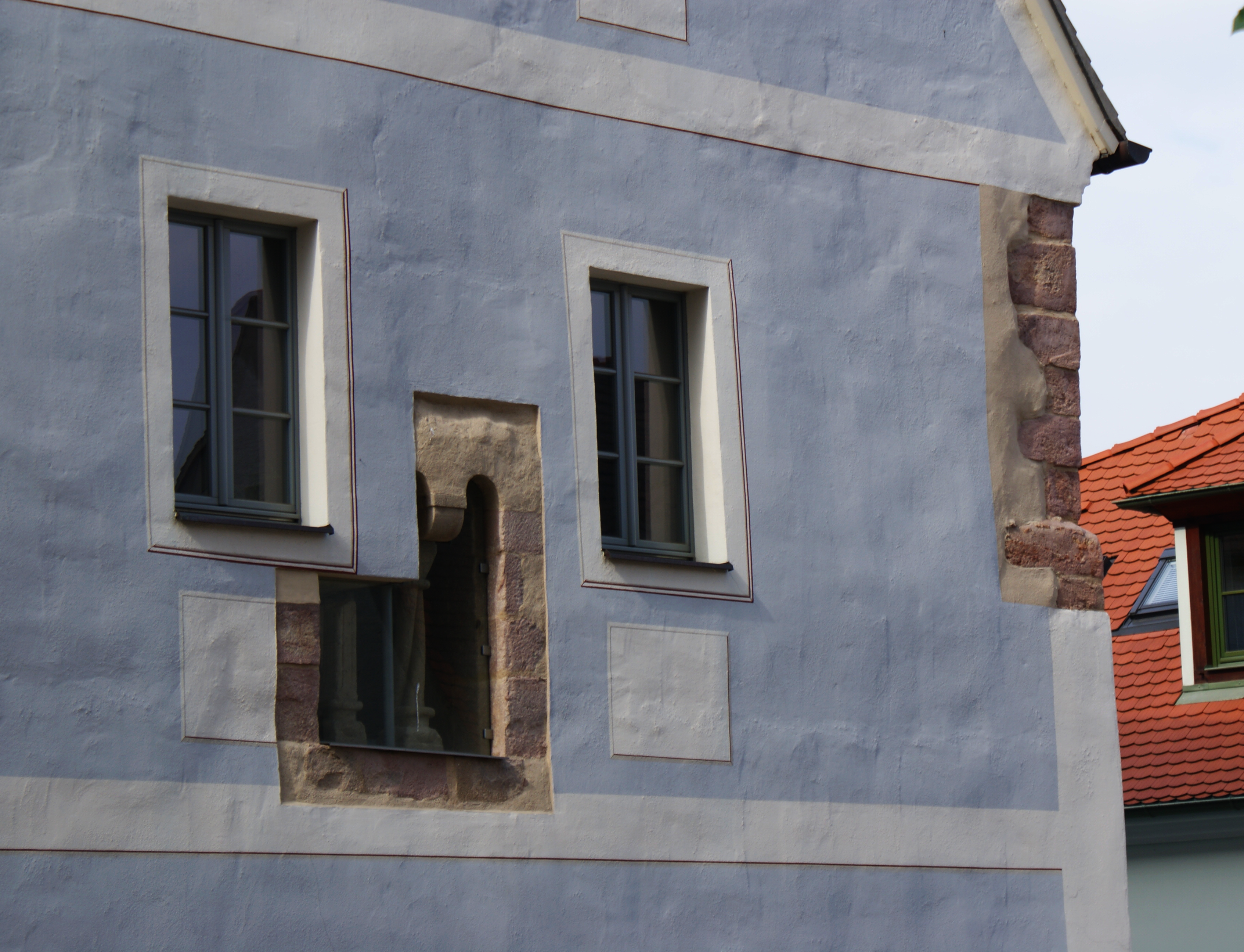 Das Vogtshaus in Oschatz (Sachsen), Detailansicht.